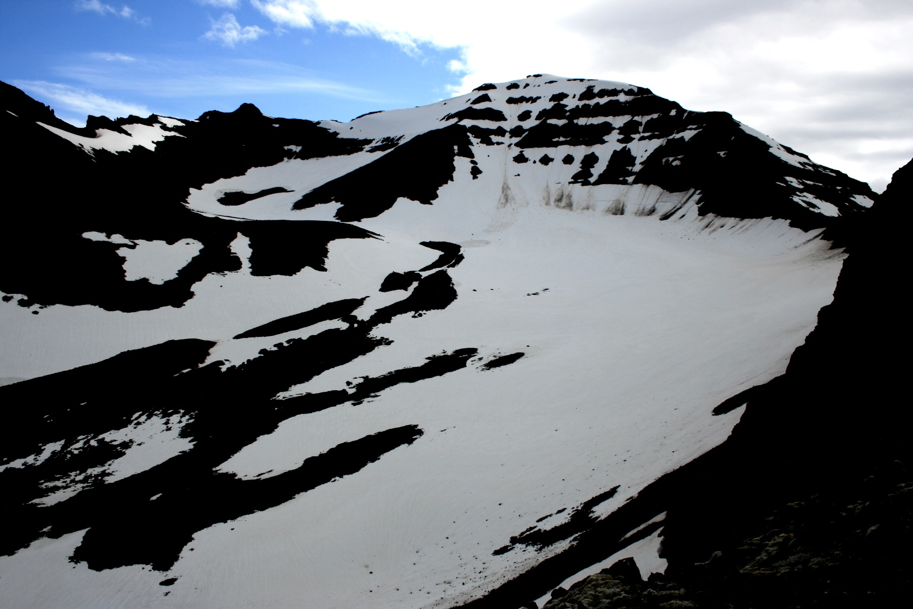 Kvarnárdalshnjúkur og Kvarnárjökull